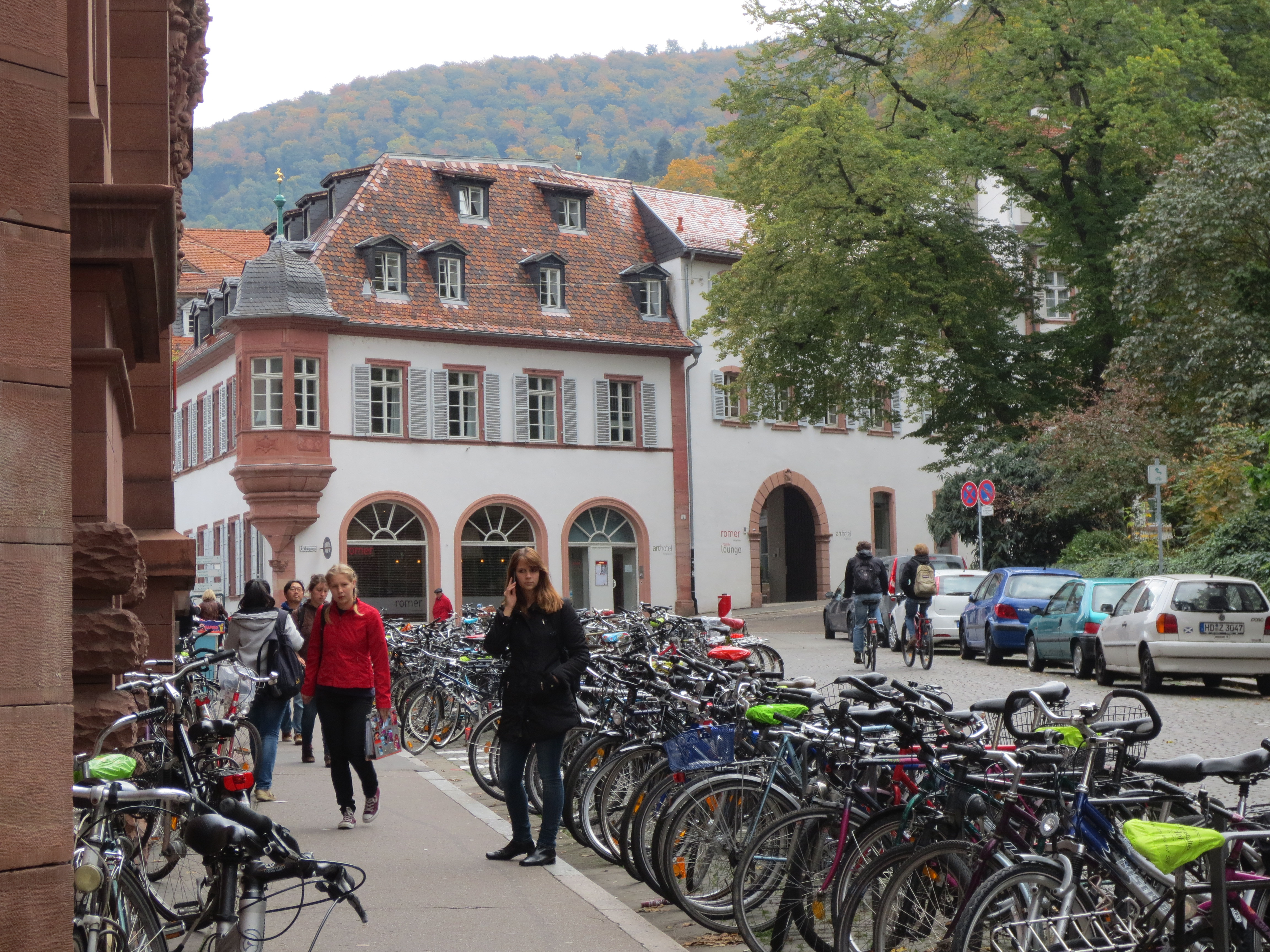 Mittagsstunde vor der Universitätsbibliothek Heidelberg